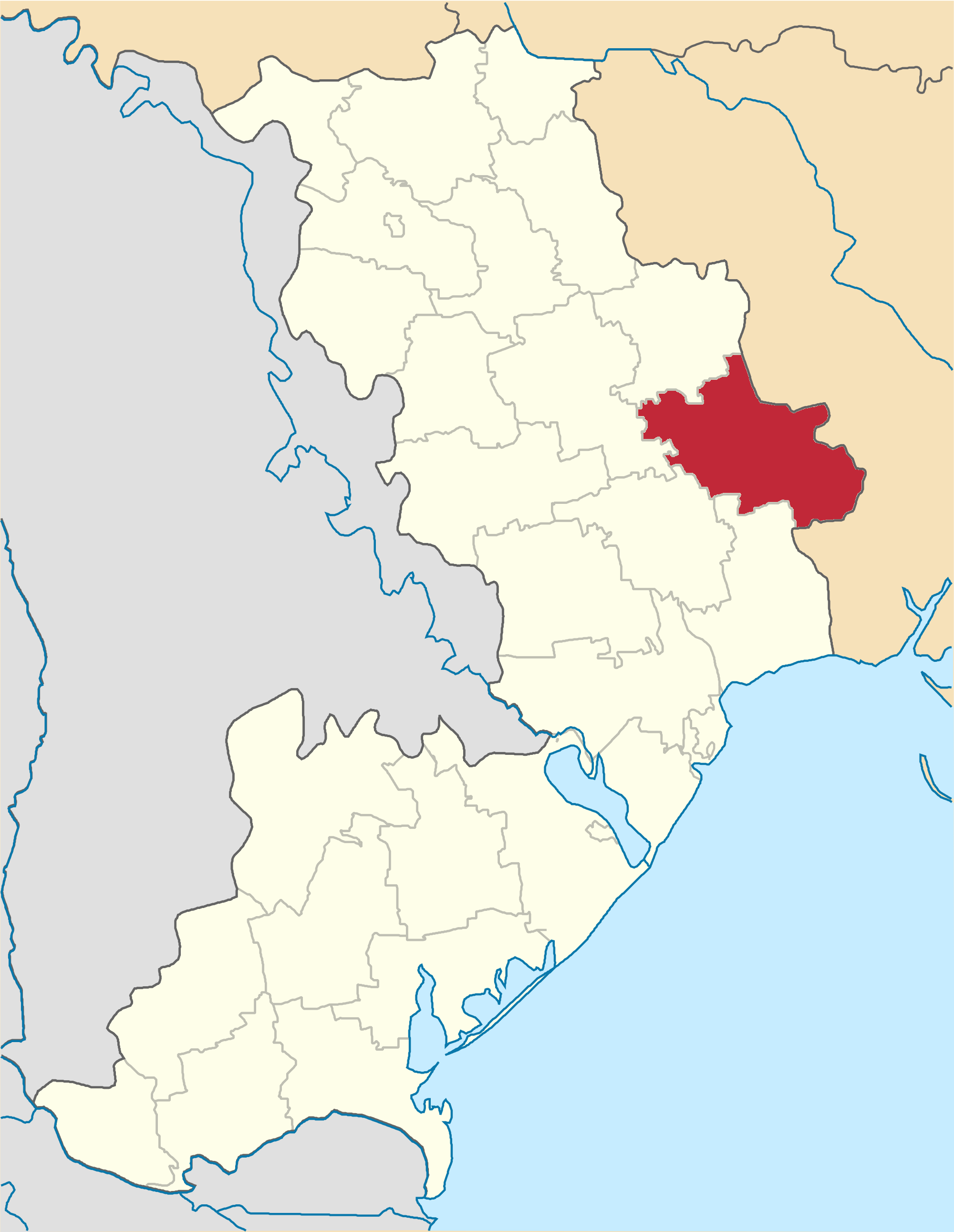 Berezivskyi-Raion map